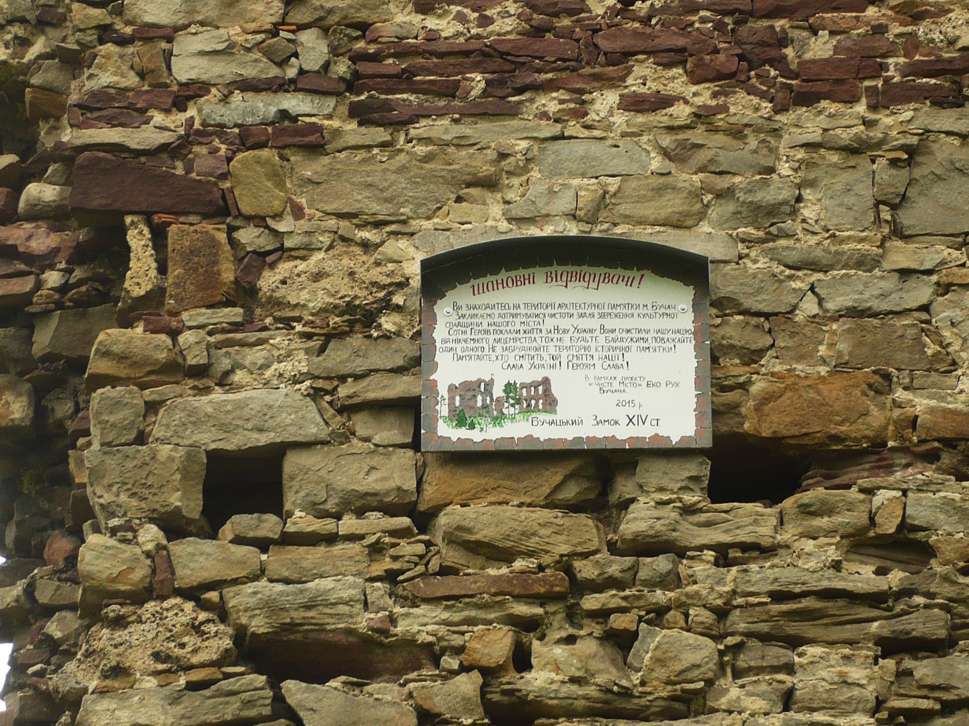 Buczacz. Zamek